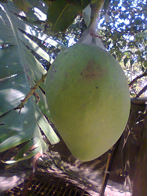 വെള്ളരി മാങ്ങ